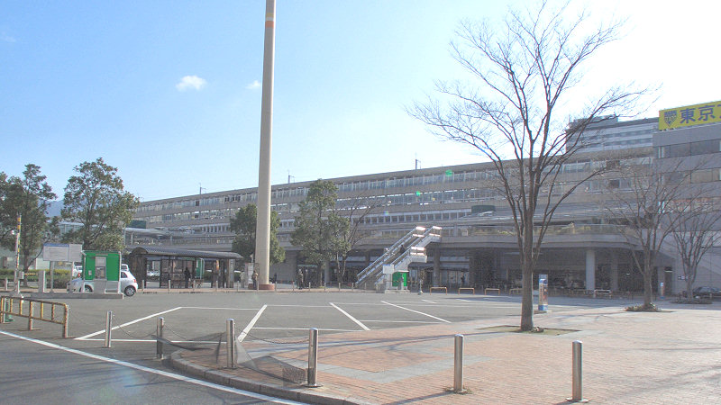 JRja:鹿児島本線ja:山陽新幹線小倉駅 北口 北口駅前広場北西より南を見る。正面は新幹線ホーム。 順光の良い写真をお持ちの方は差し替えてください。 撮影者/著者/著作権保有者 : MK Products (本人がアップロード) 撮影日 : 2007/01/19 小倉駅用にアップロードした画像です。